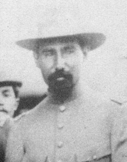 El general Maclovio Herrera Cano